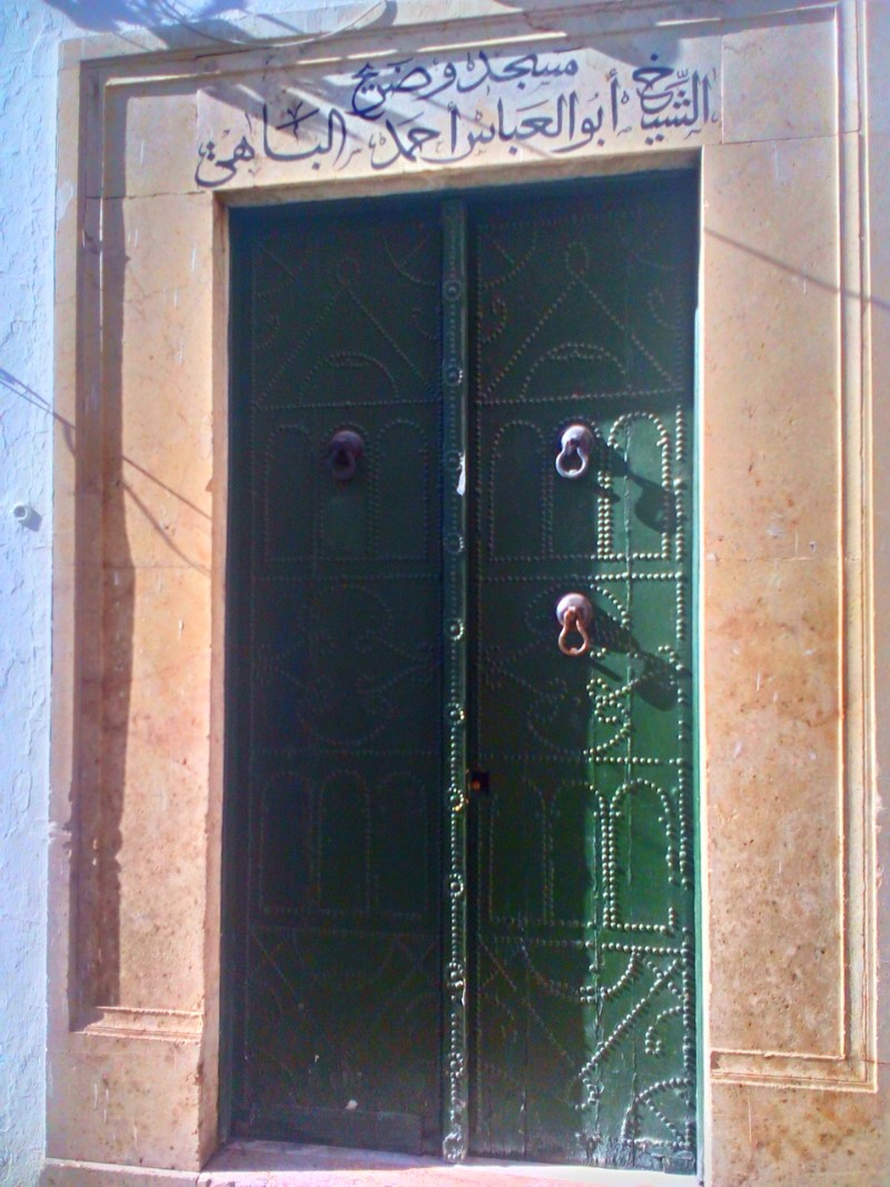 Bab Lakouas, Bab Souika , Tunis باب الأقواس ، باب سويقة ، تونس العاصمة